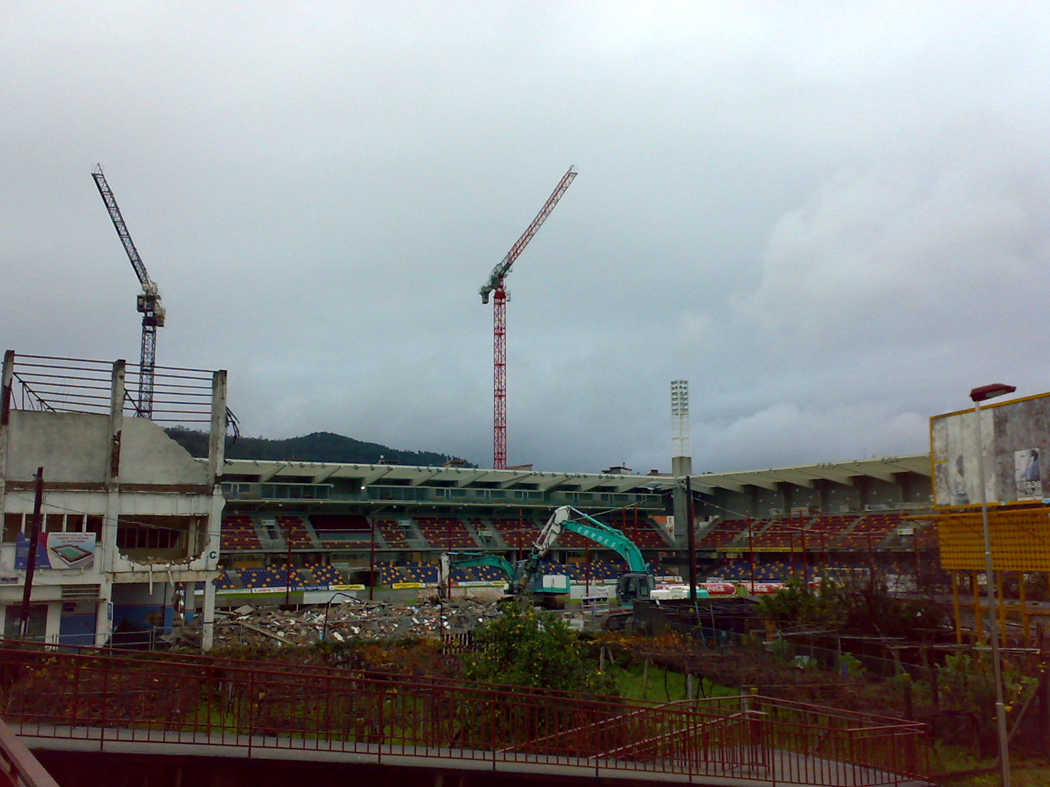 obras de reforma do Estadio Municipal de Pasarón.